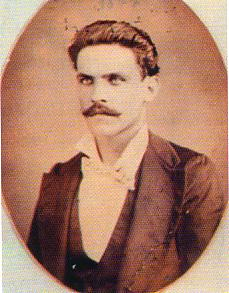 Leonardo Buñuel González